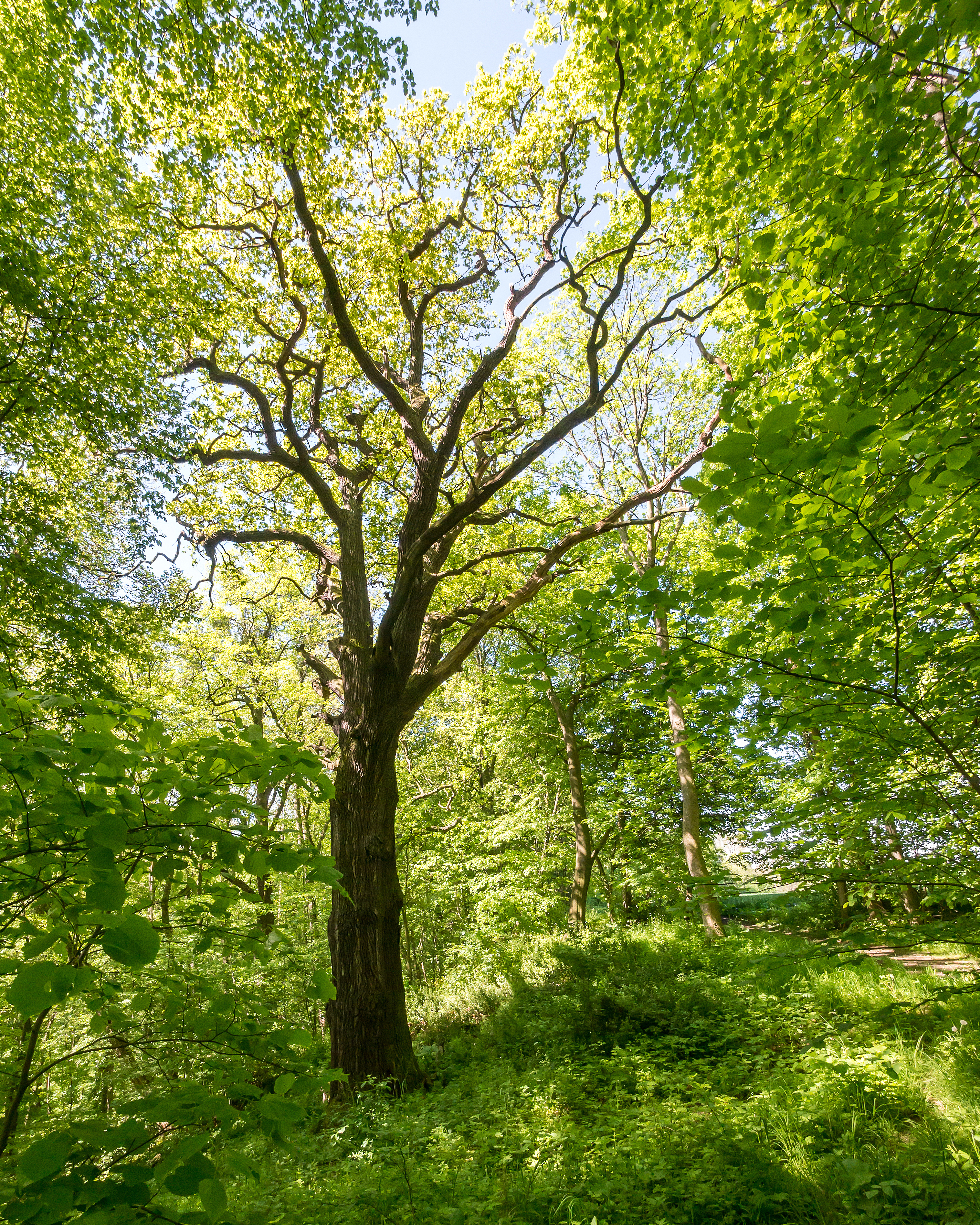 Stieleiche Doc.-Nr. 1958-01 Closewitz I